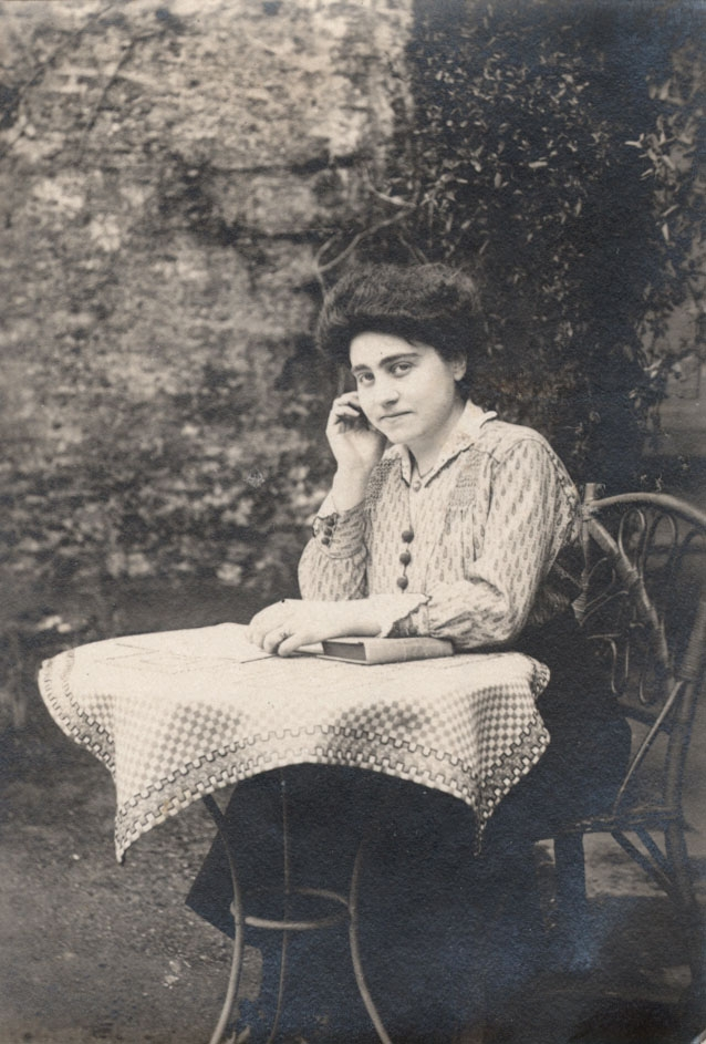 Yvonne Thooris, jarenlang bestuurslid Brugse Esperantogroep.